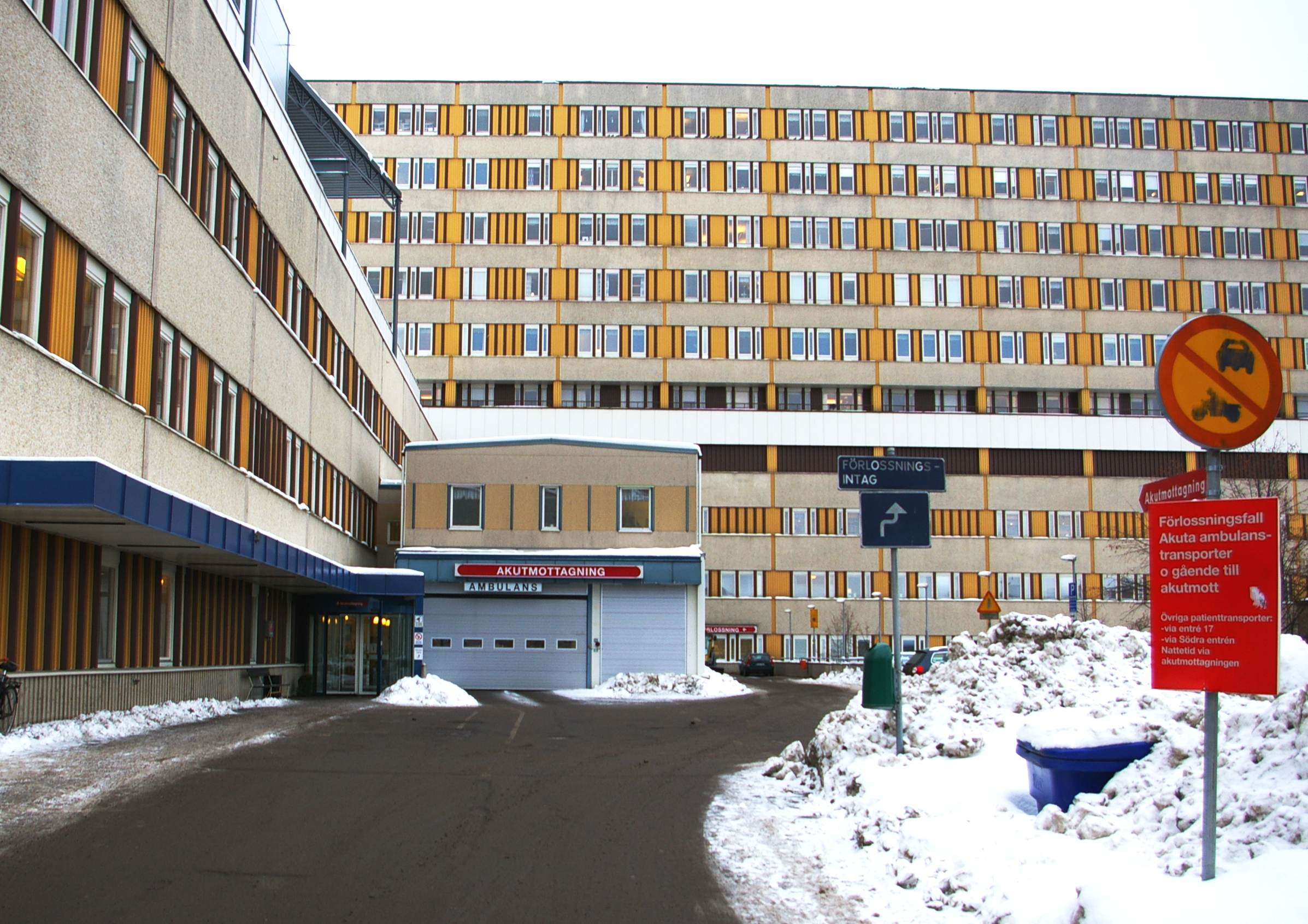 Akutintaget på Universitetssjukhuset i Linköping.